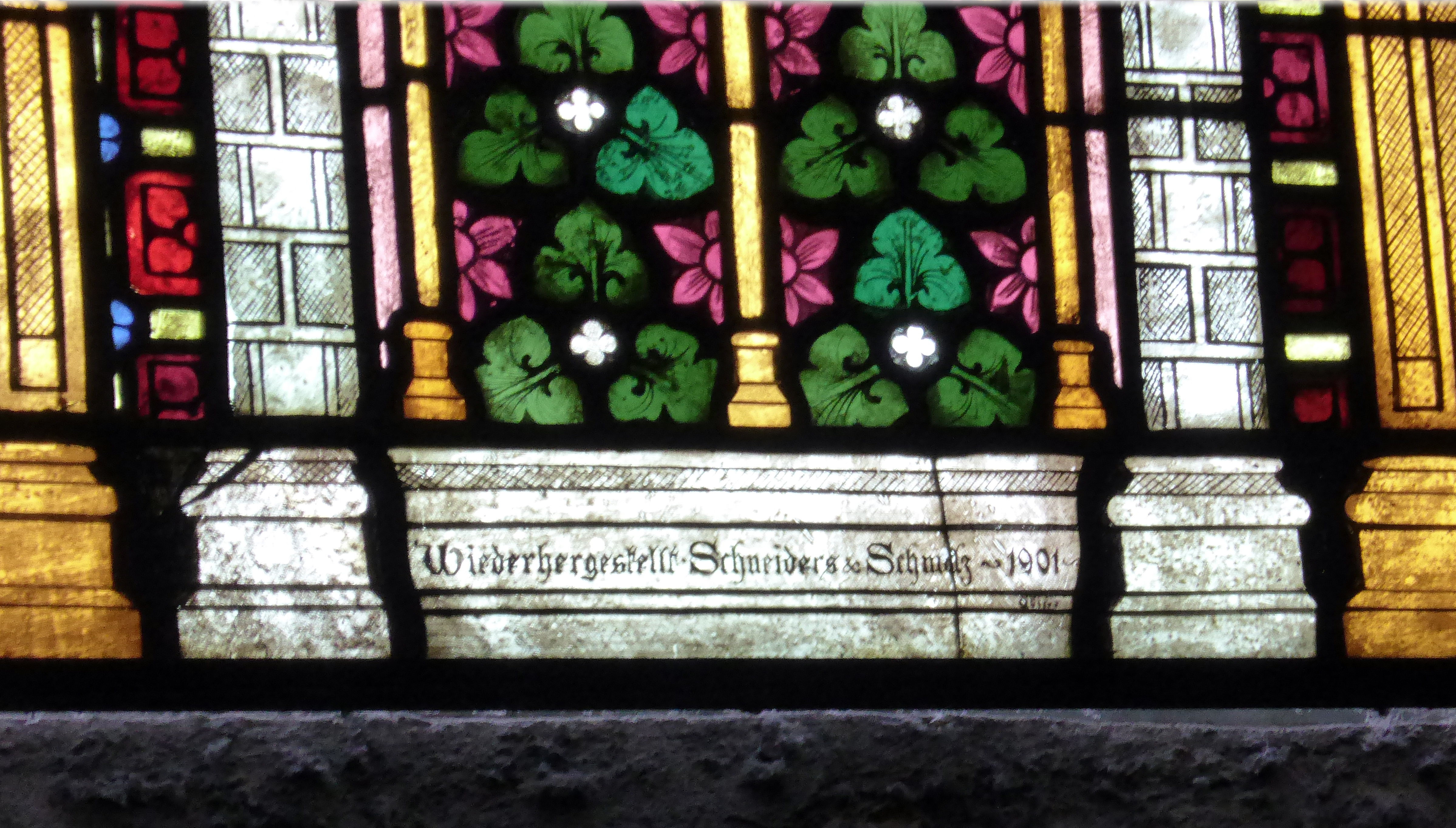 Firmensignée Glasmalerei Schneiders und Schmolz im Kölner Dom (Domchorfenster).